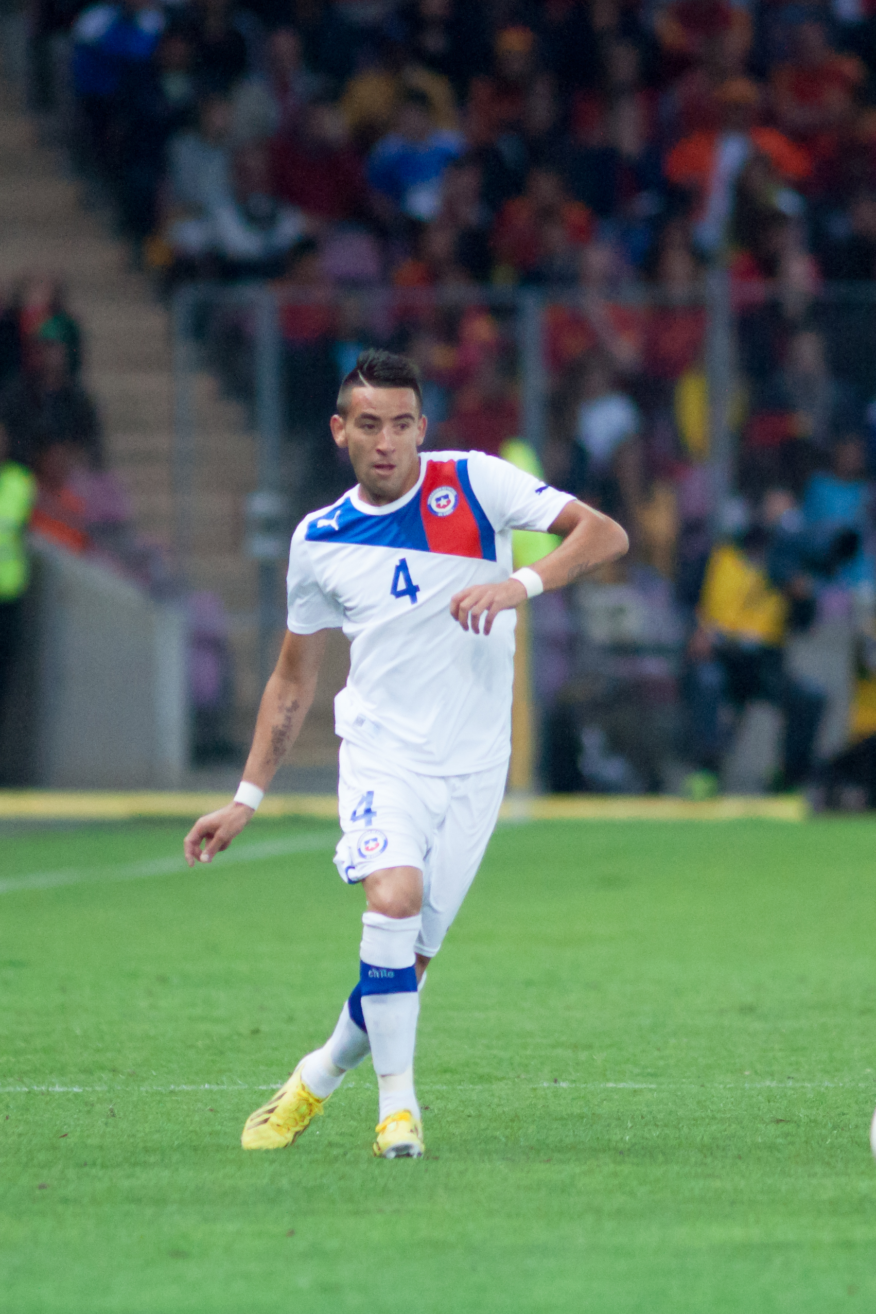 Espagne - Chili, 10 septembre 2013